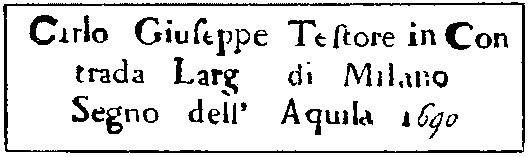 Signature Carlo-Giuseppe Testore - 1690